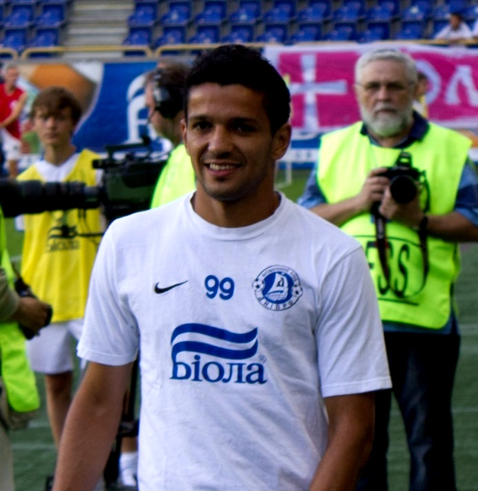 На матче Днепр - Волынь 2011.